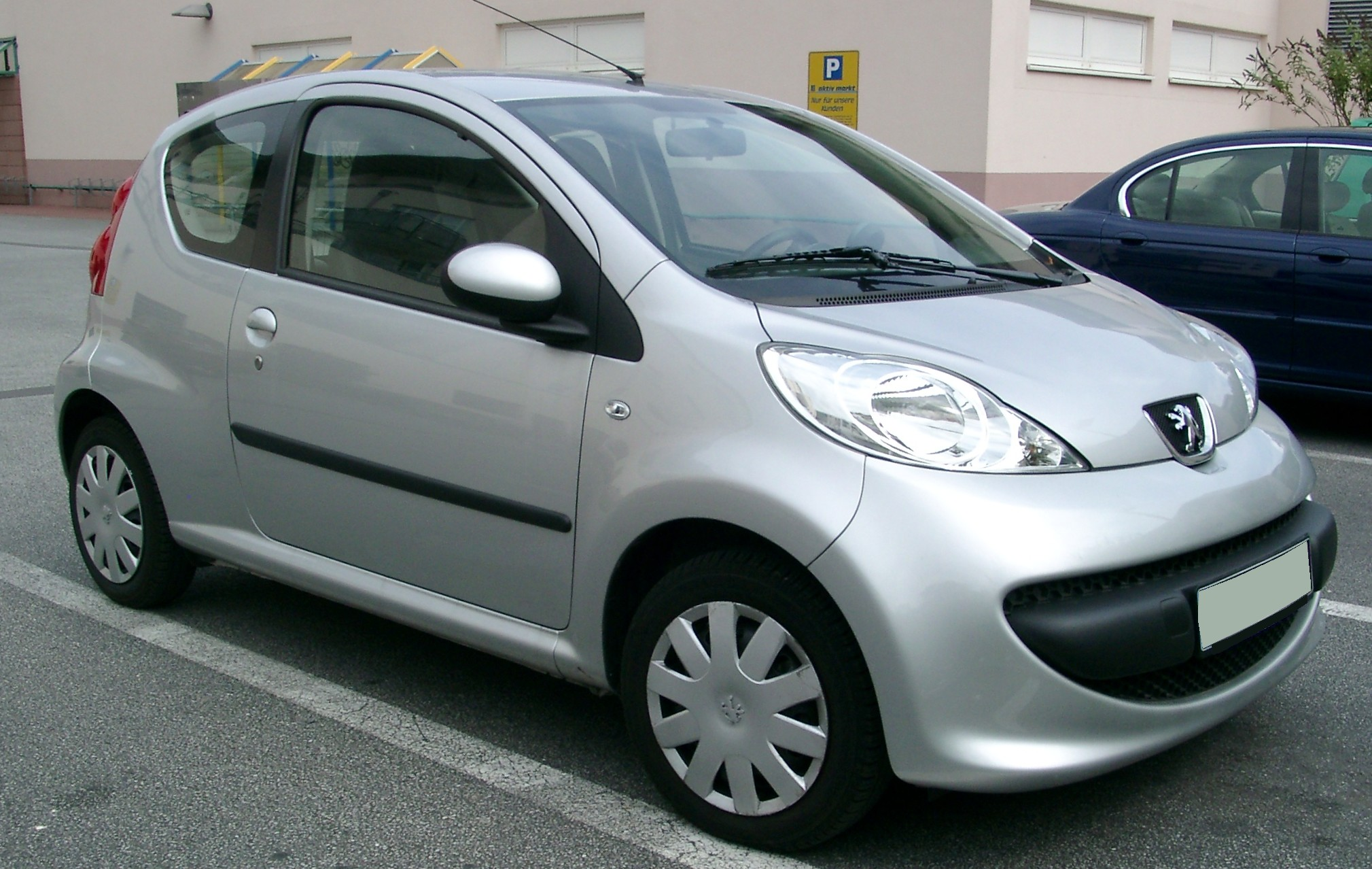 Peugeot 107